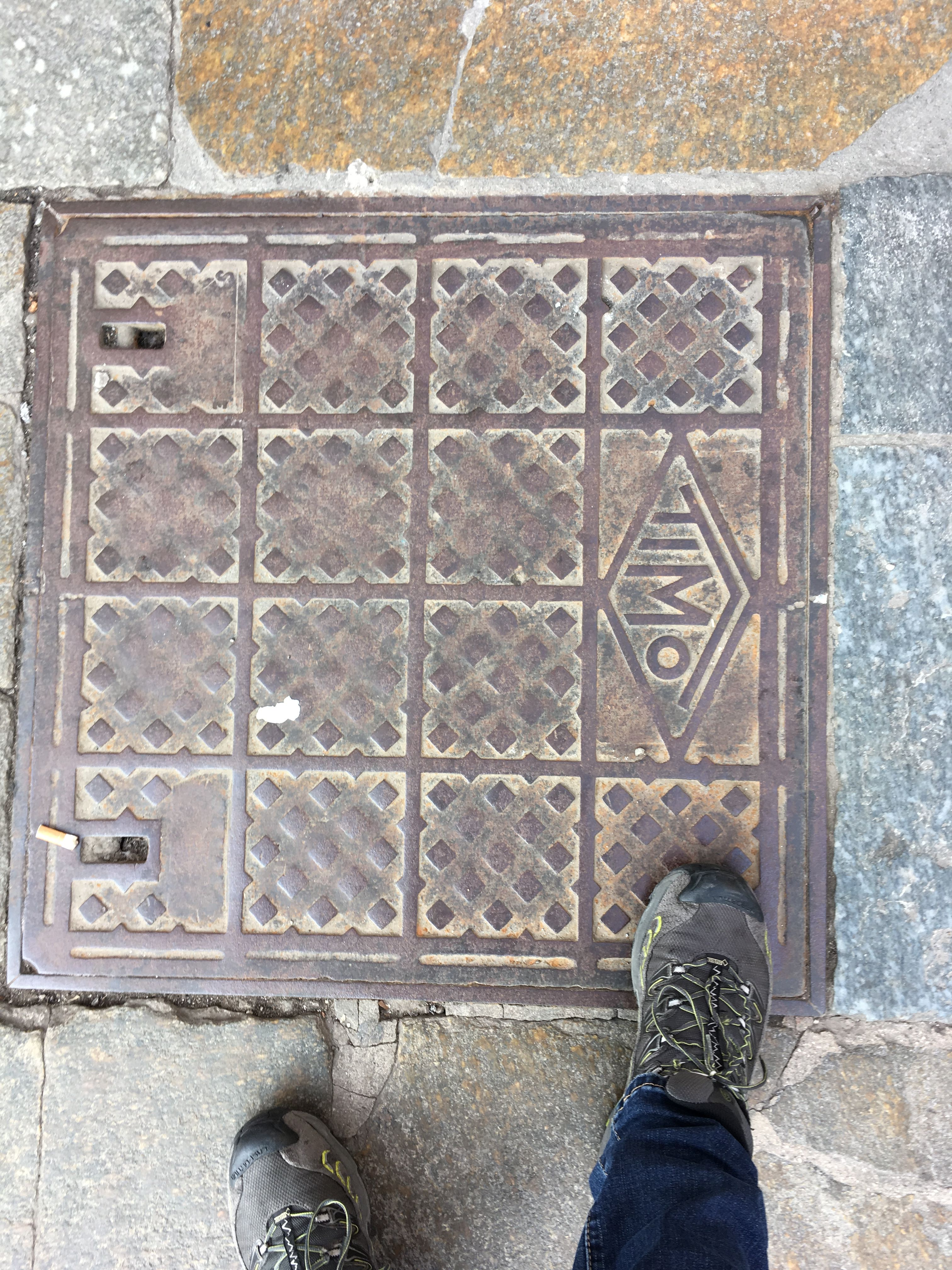 Tombino di condotte telefoniche marchiato TIMO